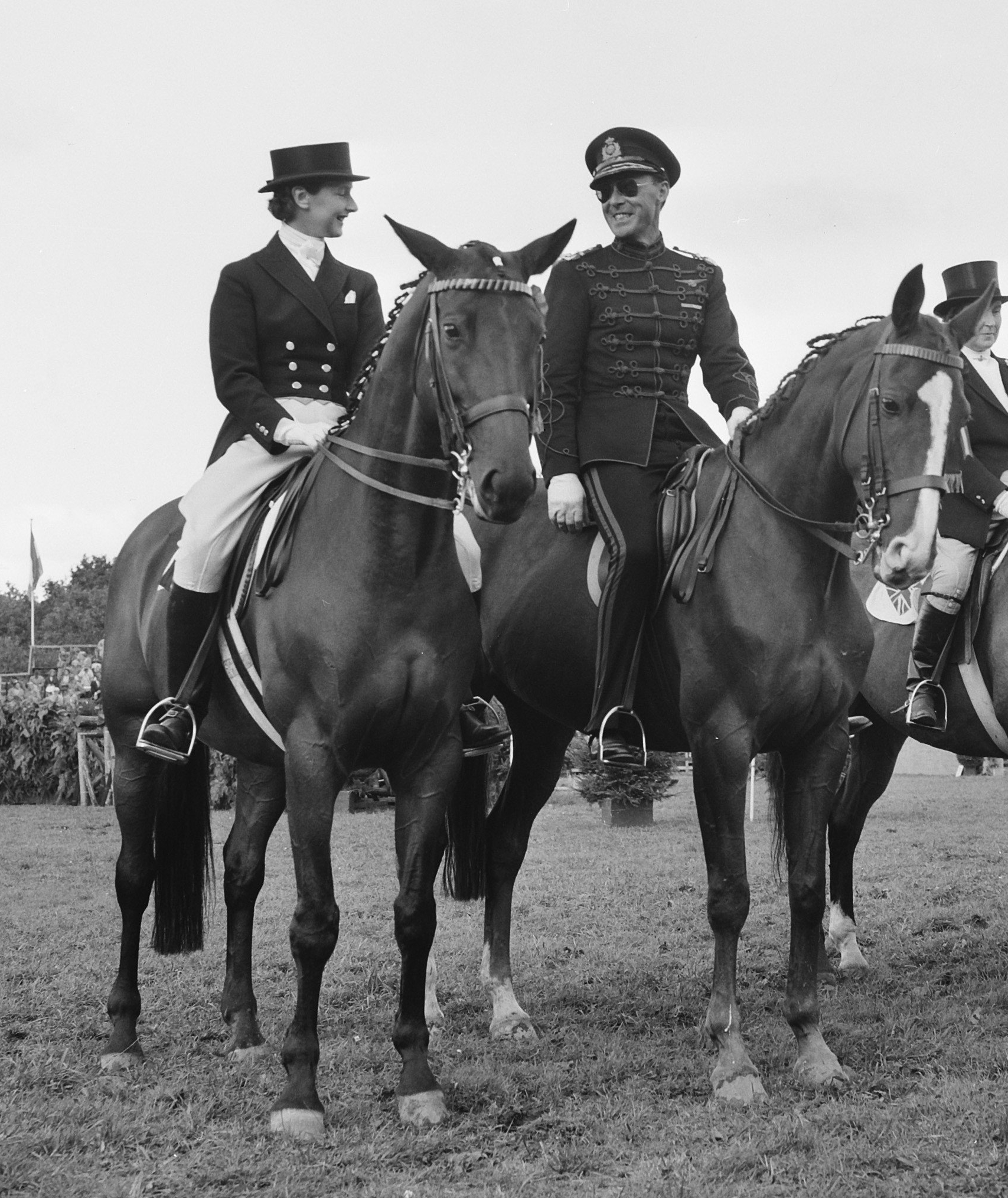 Internationale Concours Hippique Rotterdam. winnaars Dressuurproef eerste Hannelore Weygand , tweede Prins Bernhard Nationaal jeugdkampioen M.